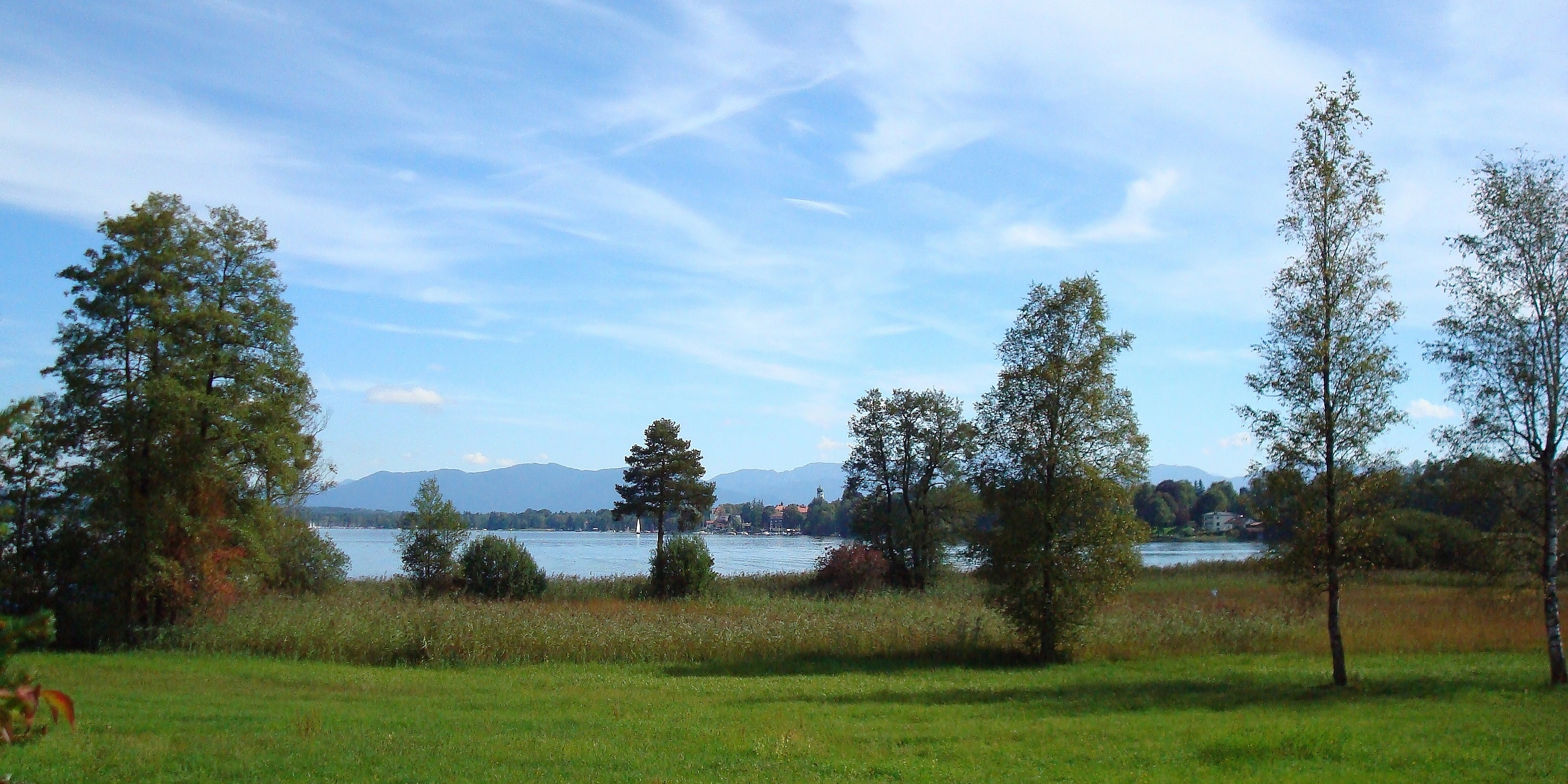 Starnberger See mit Blick auf Seeshaupt und die Alpen